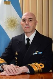 Vicealmirante (VGM) Miguel Ángel Máscolo.